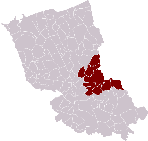 Locatie Kanton Steenvoorde in het arrondissement Duinkerke, Frankrijk - zelfgemaakt Location Canton of Steenvoorde in the Dunkirk district, France - self made Localisation Canton de Steenvoorde dans l'arrondissement de Dunkerque, France - fait moi-même